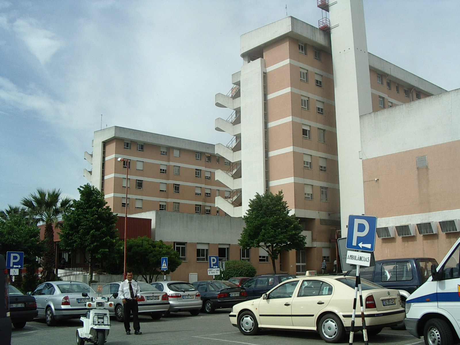 Aspeto do Hospital Garcia de Orta, Almada